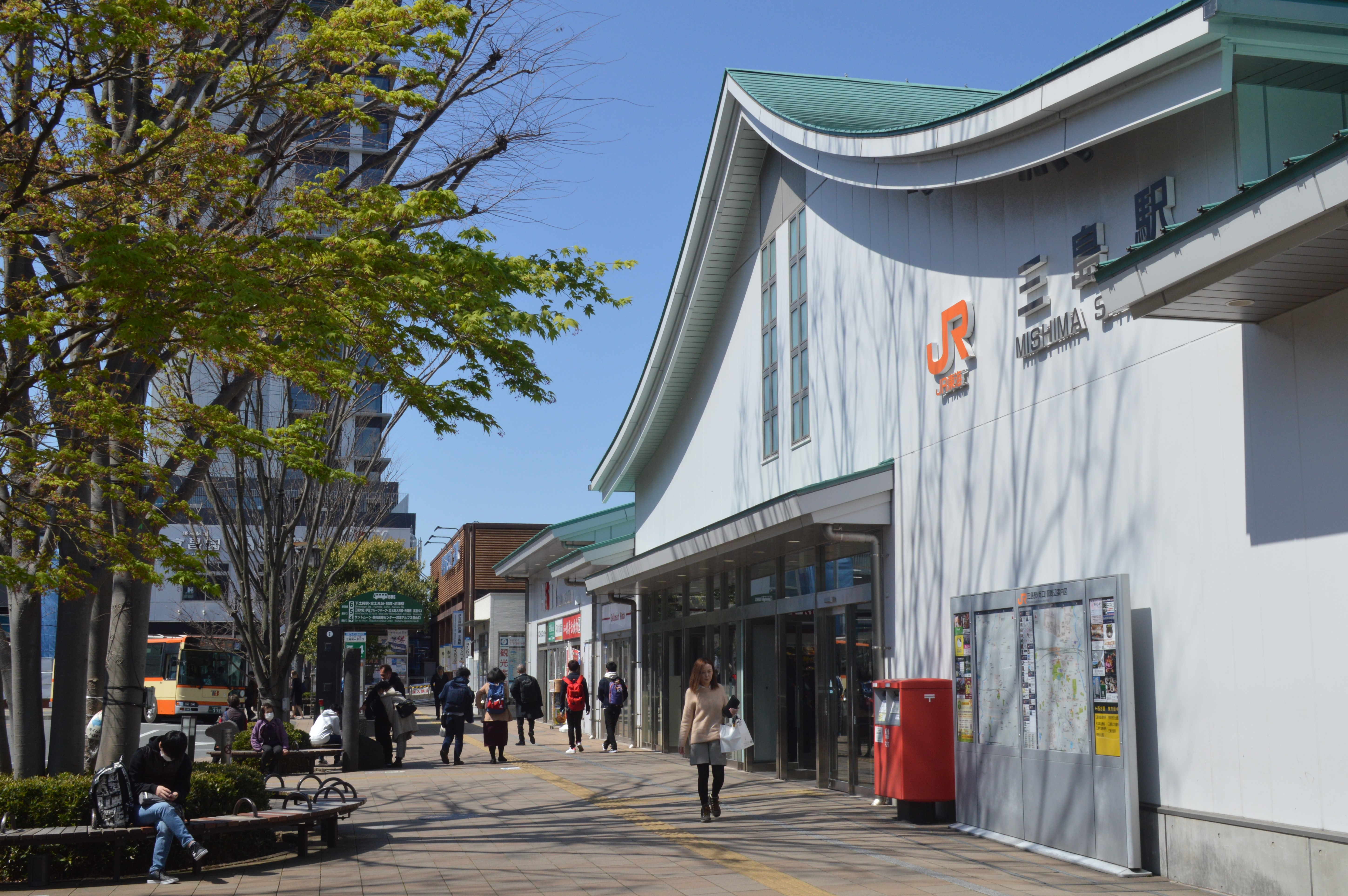 静岡県三島市にあるJR三島駅。